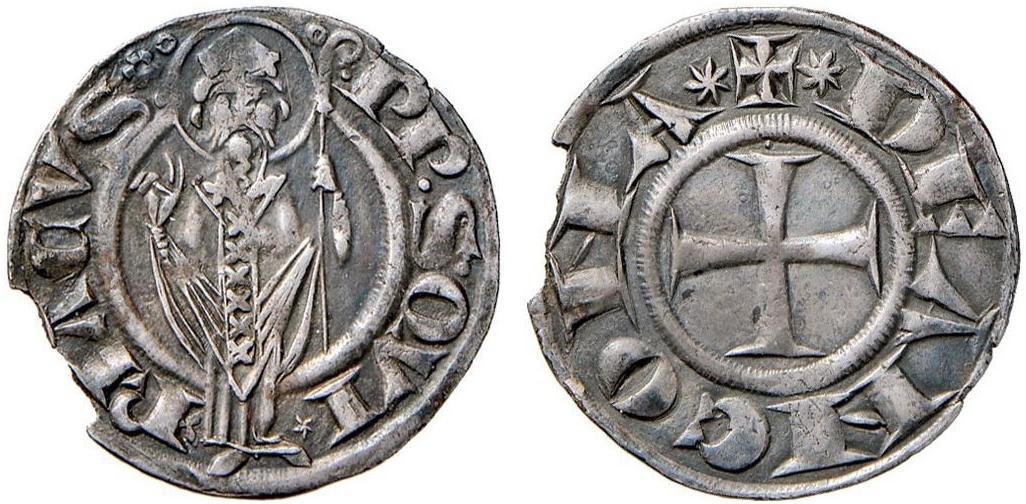 13-14 вв